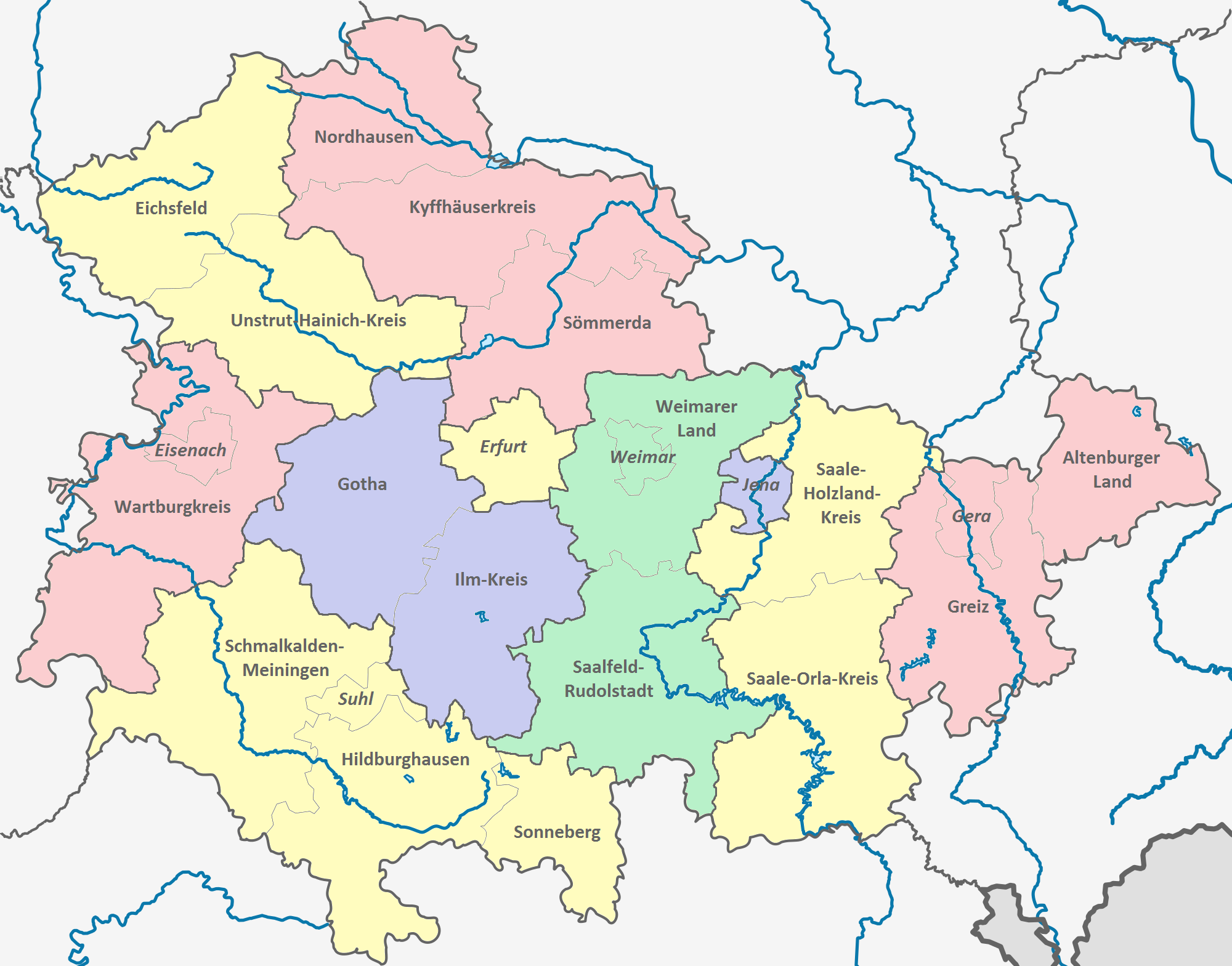 Karte des Vorschlags zu einer Kreisgebietsreform in Thüringen durch Prof. Bogumil.